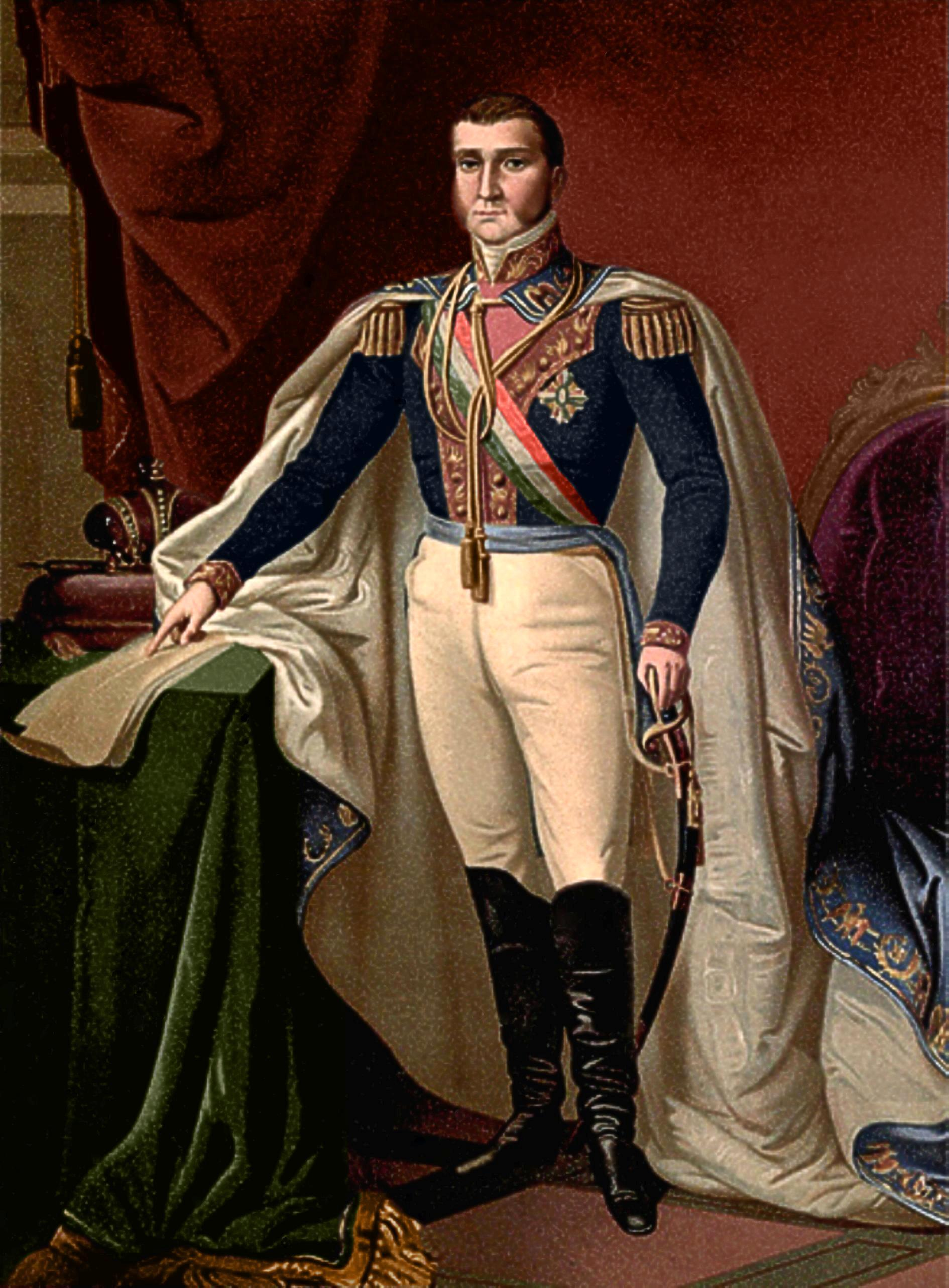 Retrato de Agustin de Iturbide como Emperador de Mexico.